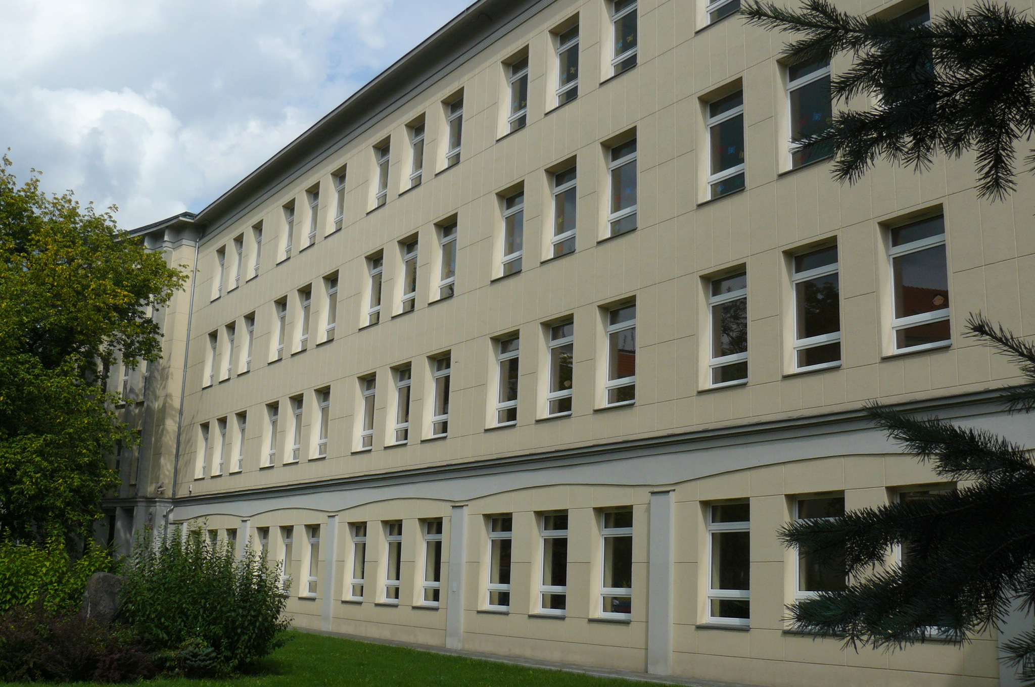 Szkoła przy ul. Łukaszewicza w Poznaniu.